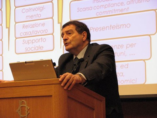 Nicola Alberto De Carlo Convegno organizzato dalla Società Italiana di Psichiatria e Psicologia Aeronautica e Spaziale